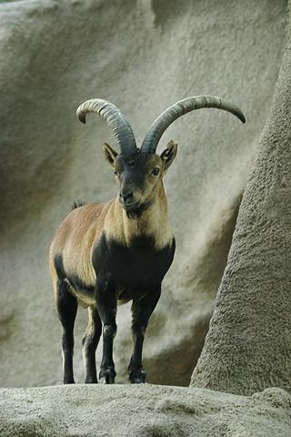 Ibex